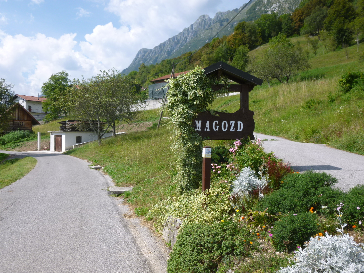 27 Magozd von hinten